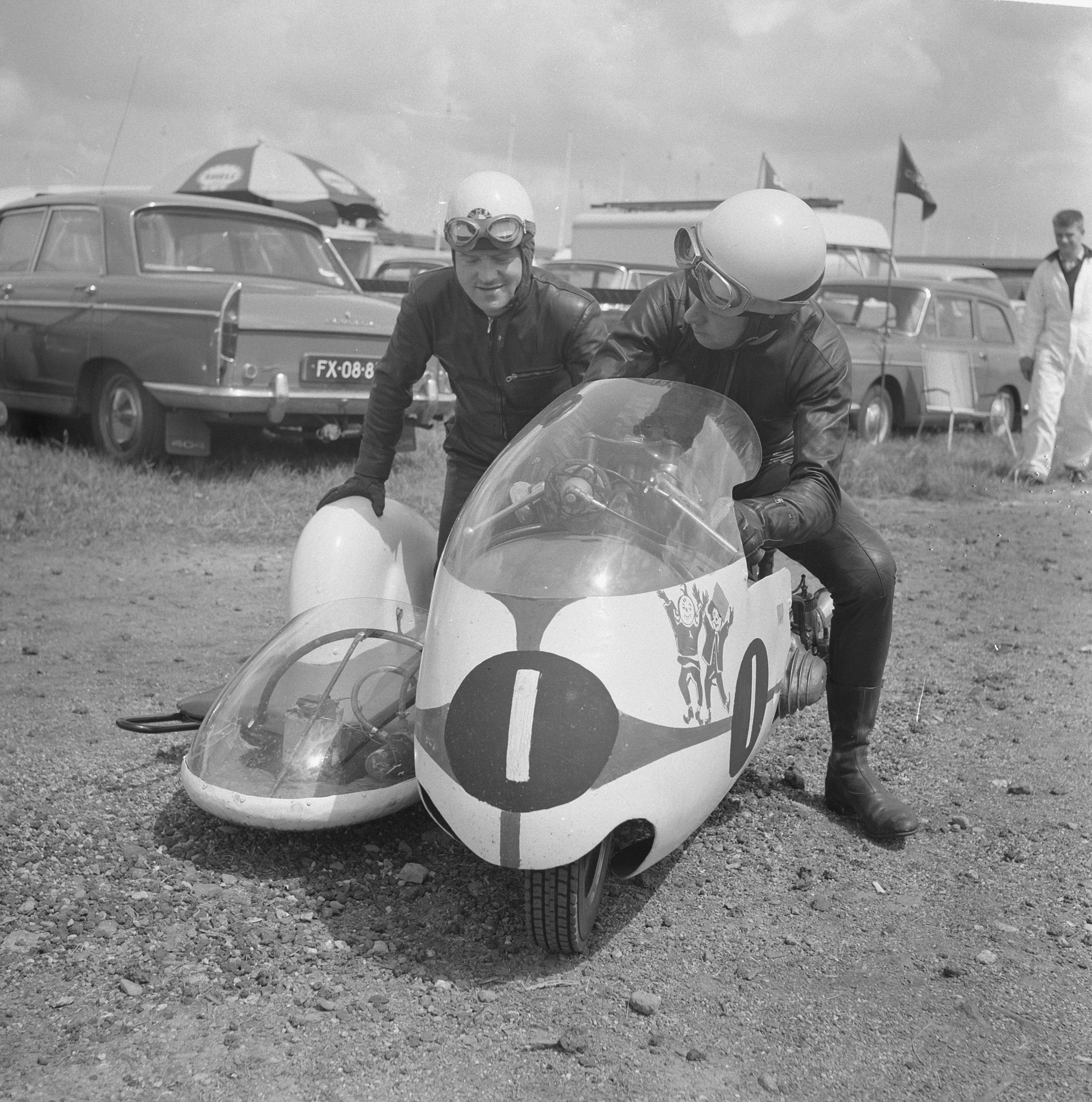 Collectie / Archief : Fotocollectie Anefo Reportage / Serie : TT Assen 1963 Beschrijving : Kanshebbers TT in Assen. Max Deubel en Emil Hoerner voor Duitsland zijspan grote kanshebbers Datum : 27 juni 1963 Locatie : Assen, Drenthe Trefwoorden : motorsport, motorsport, sport Persoonsnaam : Deubel Max, Hoerner Emil Fotograaf : Nijs, Jac. de / Anefo Auteursrechthebbende : Nationaal Archief Materiaalsoort : Negatief (zwart/wit) Nummer archiefinventaris : bekijk toegang 2.24.01.03 Bestanddeelnummer : 915-3054 Reacties Geplaatst door Ton Kooyman op 15 mei 2009 - 01:24. en ze wonnen de race